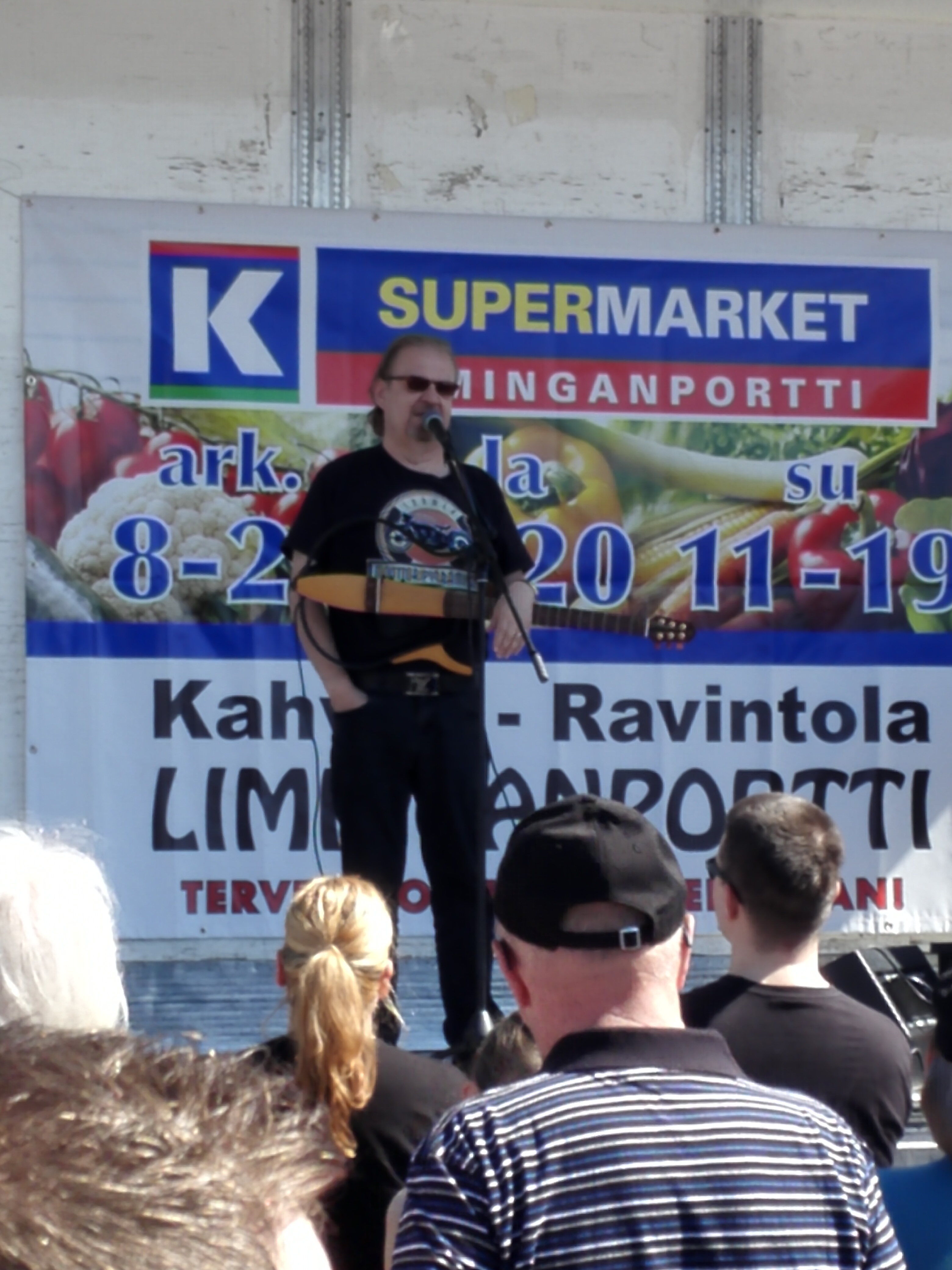 Suomalainen viihdetaiteilija Jope Ruonansuu (1964–2020) Limingan Yrittäjät Ry:n järjestämässä Limingan Markkinat -tapahtumassa Liminganportissa 28.5.2016